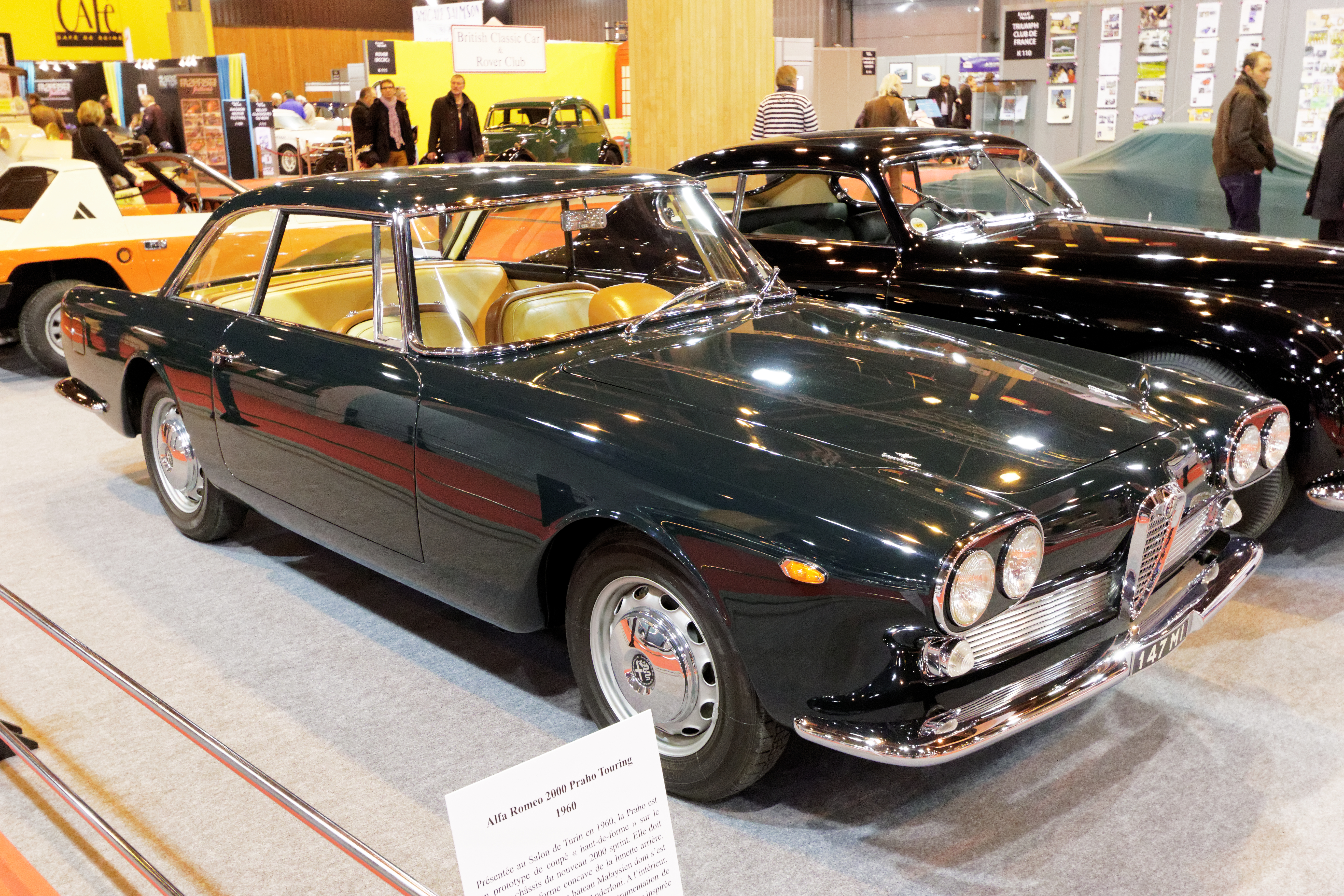 Une des voiture présentée lors du salon Rétromobile de Paris 2015